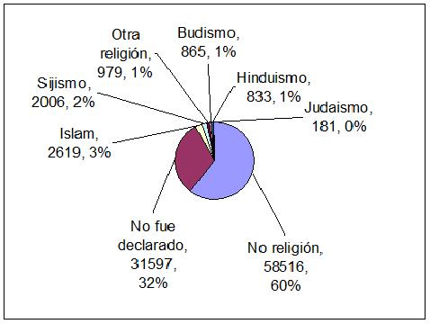 Gráfico de tarta de las minorias por religión (no cristiano) en el condado inglés de Shropshire, incluso a la autoridad unitaria de Telfod & Wrekin